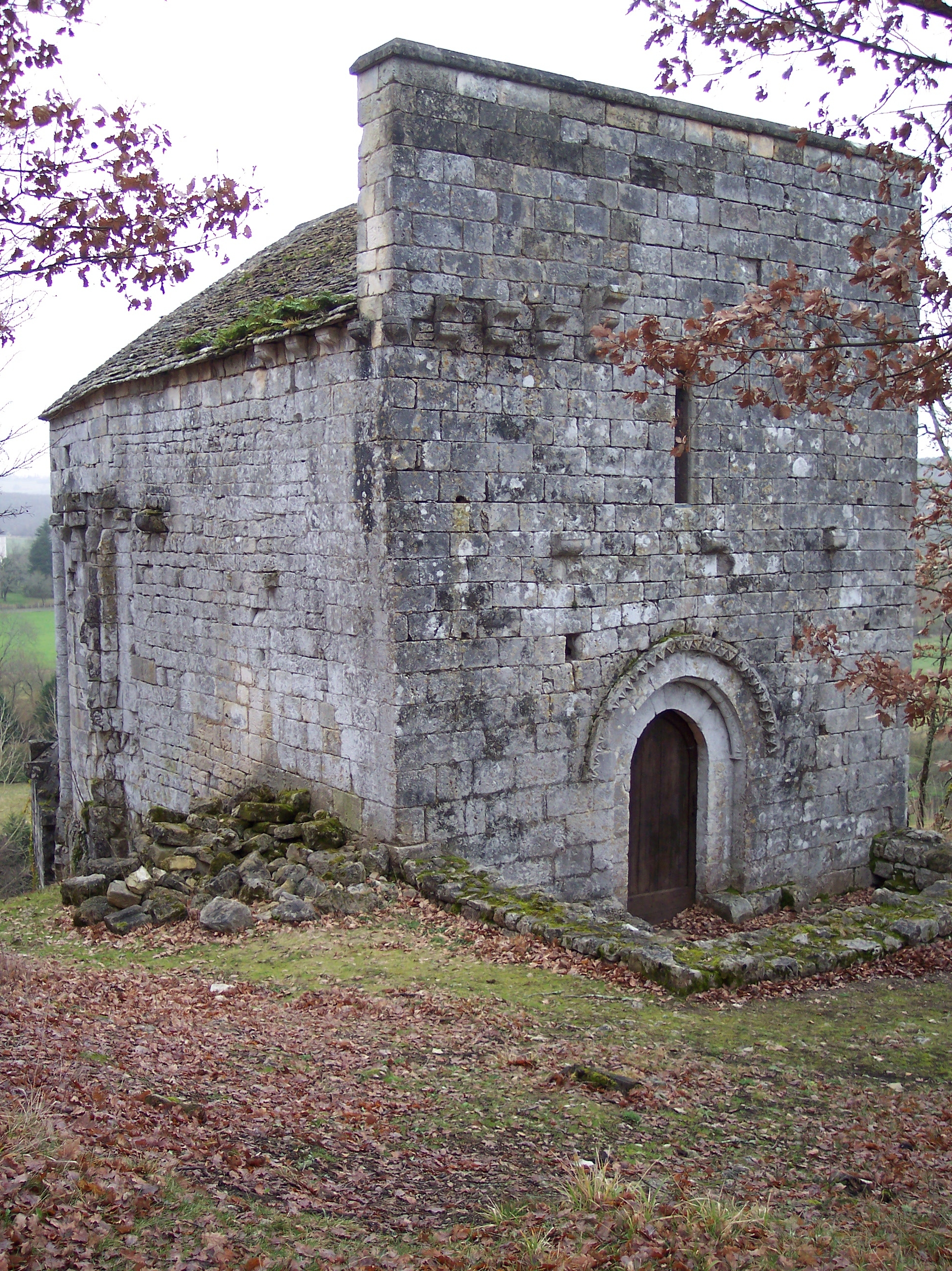 Photo du chateau d'Auberoche représentant sa chapelle. Image personnelle. Object location45° 12′ 32″ N, 0° 53′ 48″ E